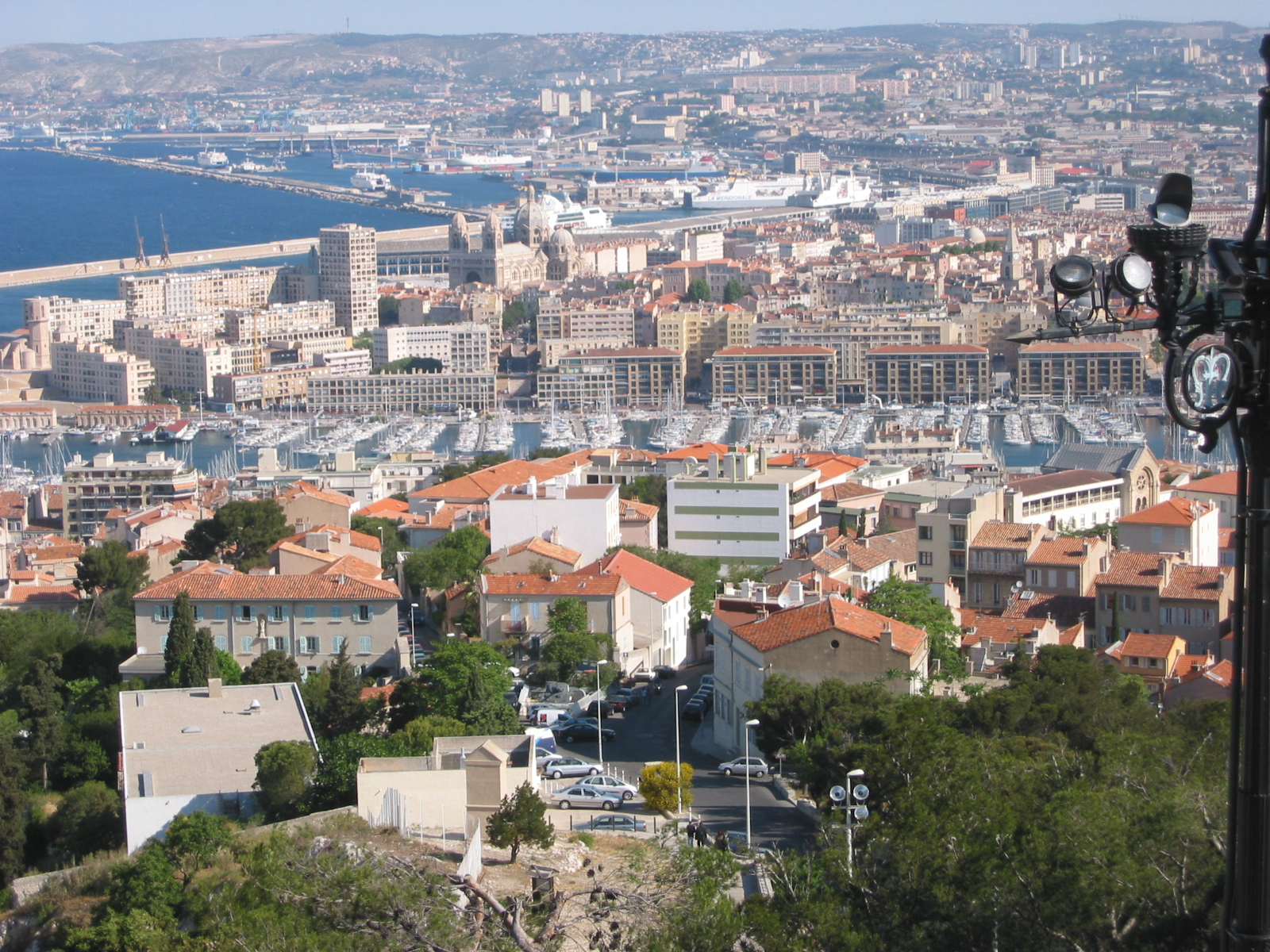 Marseille, Bouches-du-Rhône, France Les Ports Au premier plan, Le Vieux Port A l'arrière plan, le Port Autonome de Marseille Photo prise le 19 mai 2006 Aut : Jddmano